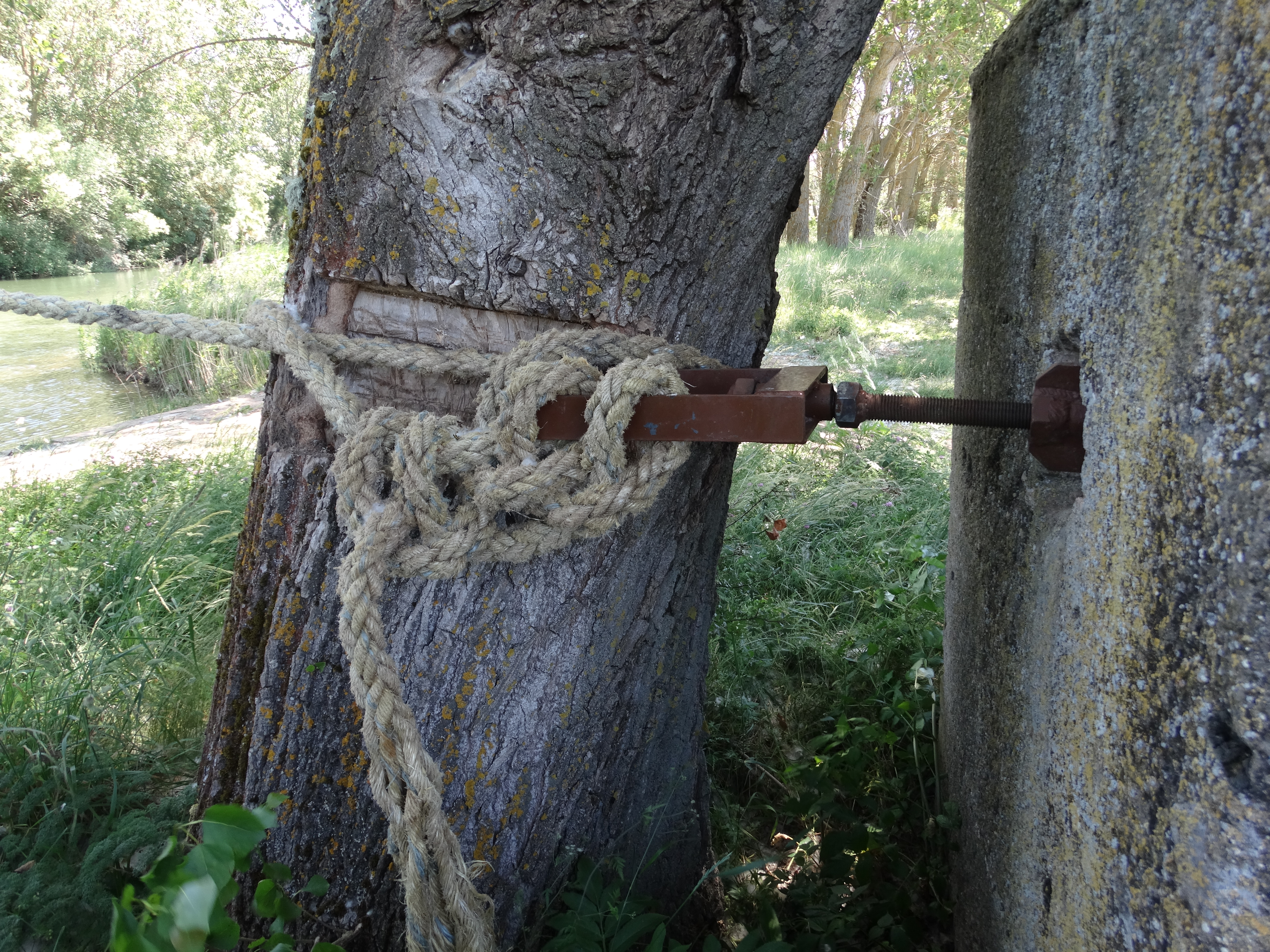 Puente Barca sobre río Pisuerga.